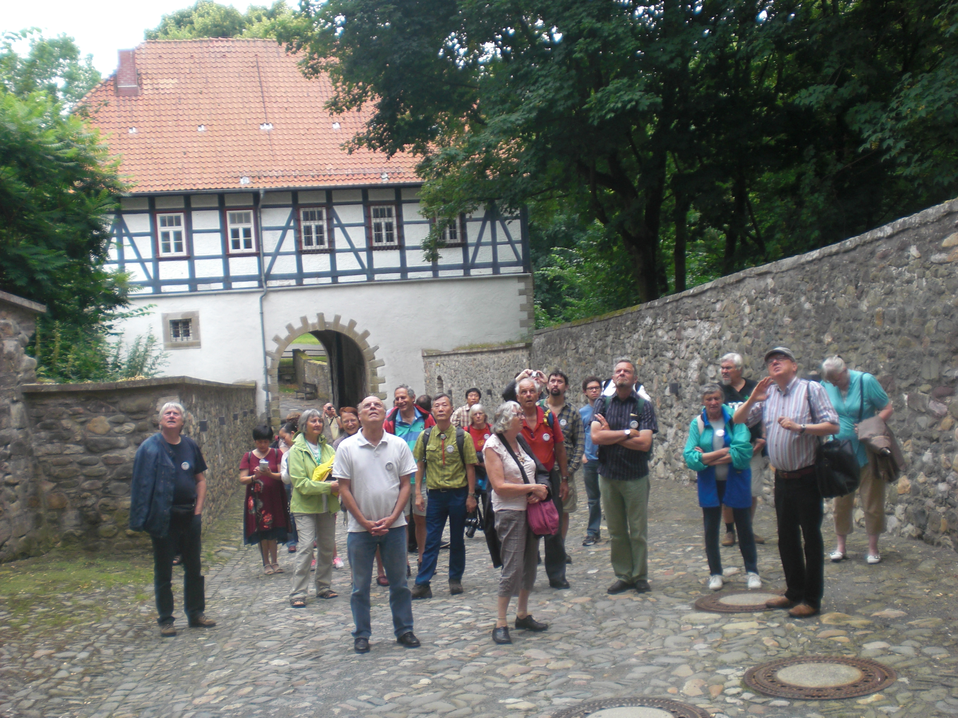 Kongresanoj en Hercbergo